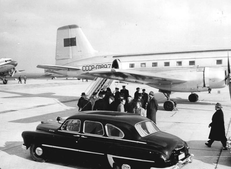 Leipzig, Flughafen, Flugzeug, Limousine Zentralbild Wlocka 1.3.1957 Leipziger Frühjahrsmesse 1957 Blick auf den Flugplatz Leipzig-Mockau, wo zur Zeit die ersten ausländischen Maschinen Messegäste bringen.